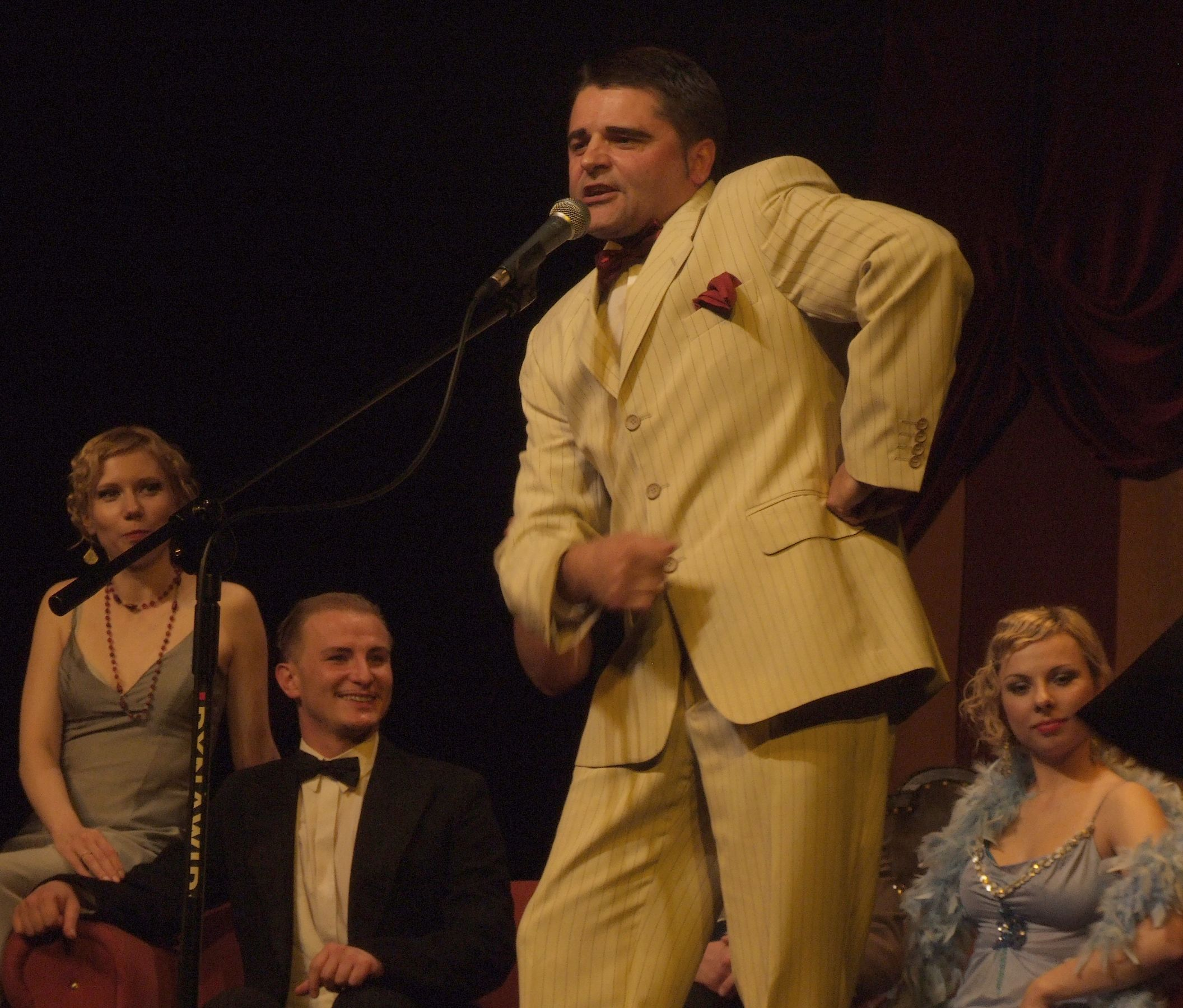 Janusz Rewers